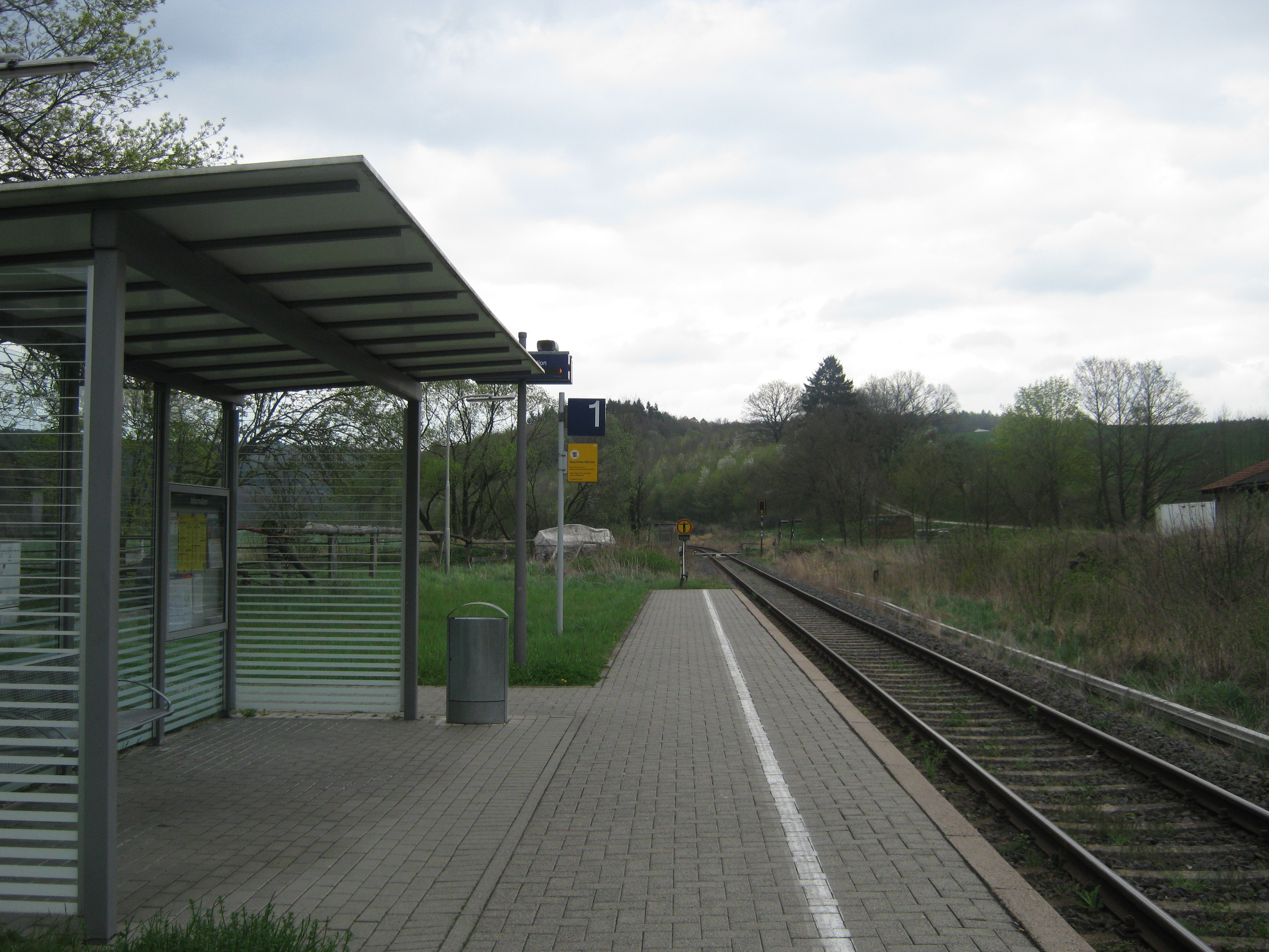 Haltepunkt Offensen an der Bahnstrecke Göttingen-Bodenfelde, betrieben von der NordWestBahn.